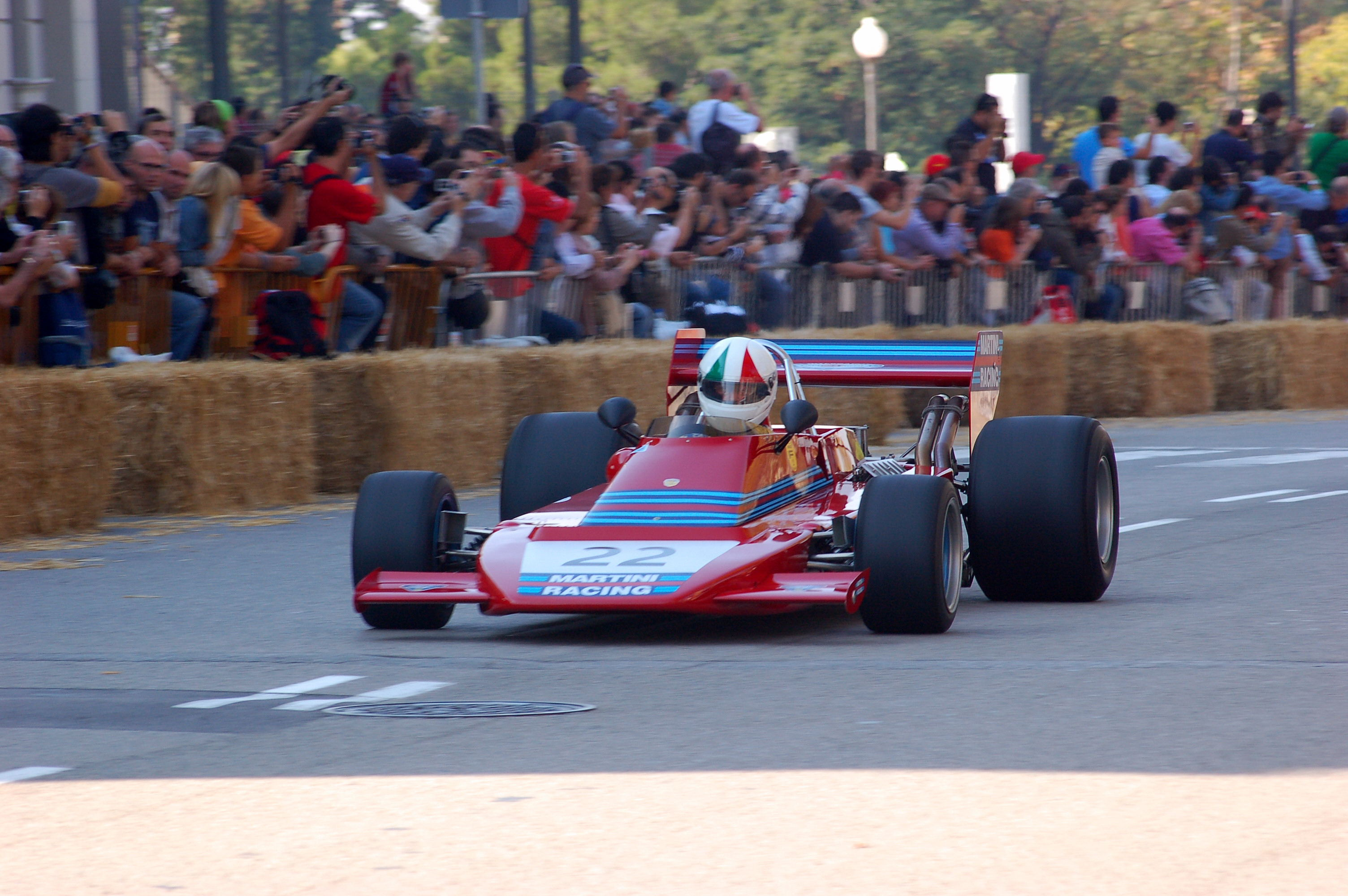 Ferrari 312 - Cris Amon